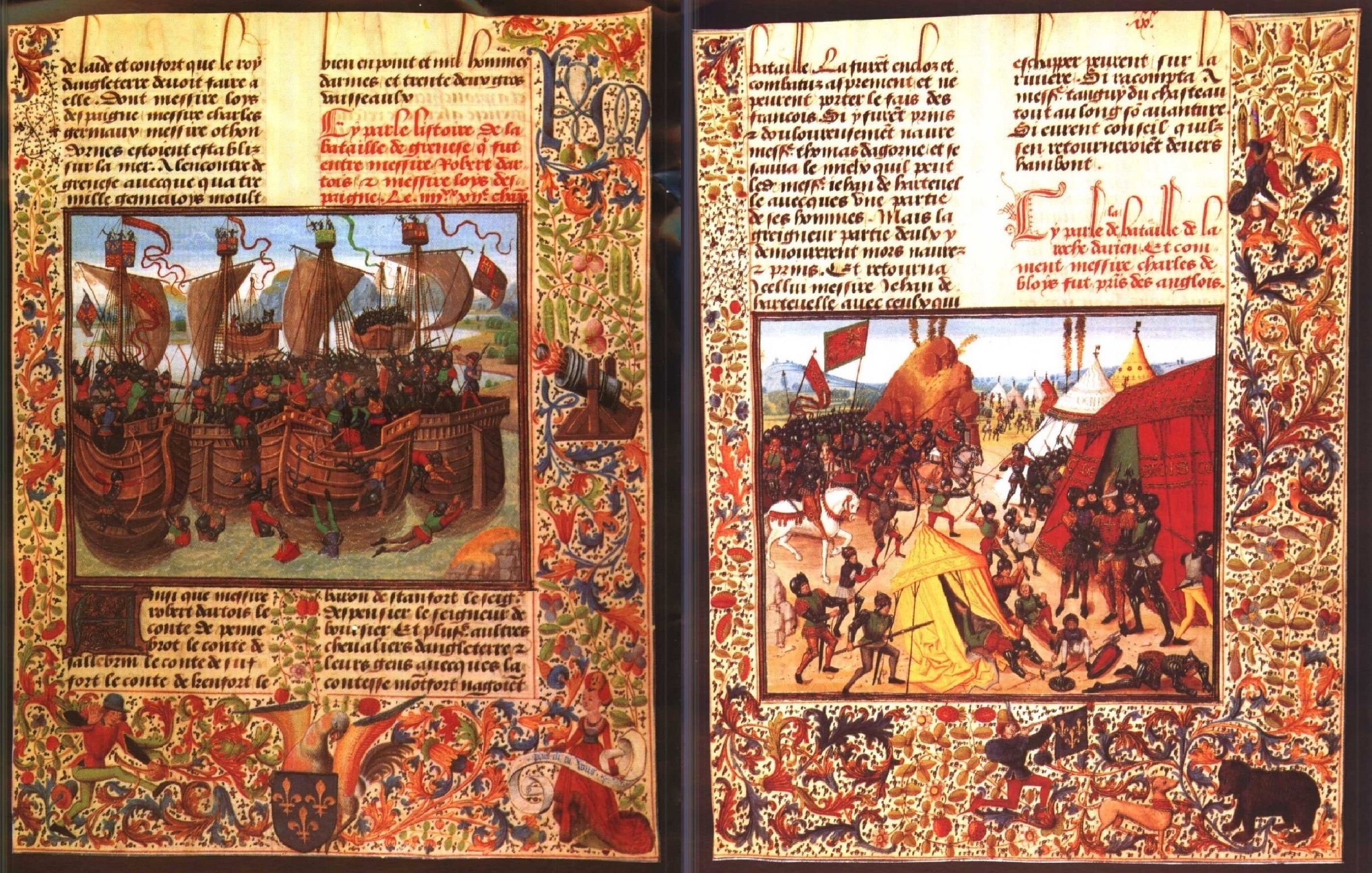 Izquierda: «Batalla de Guernesey en 1342»; Derecha: «Batalla de la Roche Derrien y captura de Carlos de Blois en 1347». Miniaturas en Jean Froissart, Chroniques, siglo XV, manuscrito francés, BnF, París. — Presentación del libro La escritura: Memoria de la humanidad de Georges Jean, colección «Biblioteca ilustrada / Descubrir la arqueología» (nº 15), 2012. Descripción en la página 152. 中文（台灣）: 傅華薩《大事記》書中的纖細畫。法國手抄本，15世紀。左：1342年的格恩西（Guernesey）海戰中，交戰雙方的武裝船隻纏鬥不休；右：1347年的得瑞恩山（Roche Derrien）之役，布魯瓦的查理（Charles de Blois）被俘。——資料出自《文字與書寫：思想的符號》，「發現之旅」叢書第1冊，Georges Jean/著。時報文化，1994年。